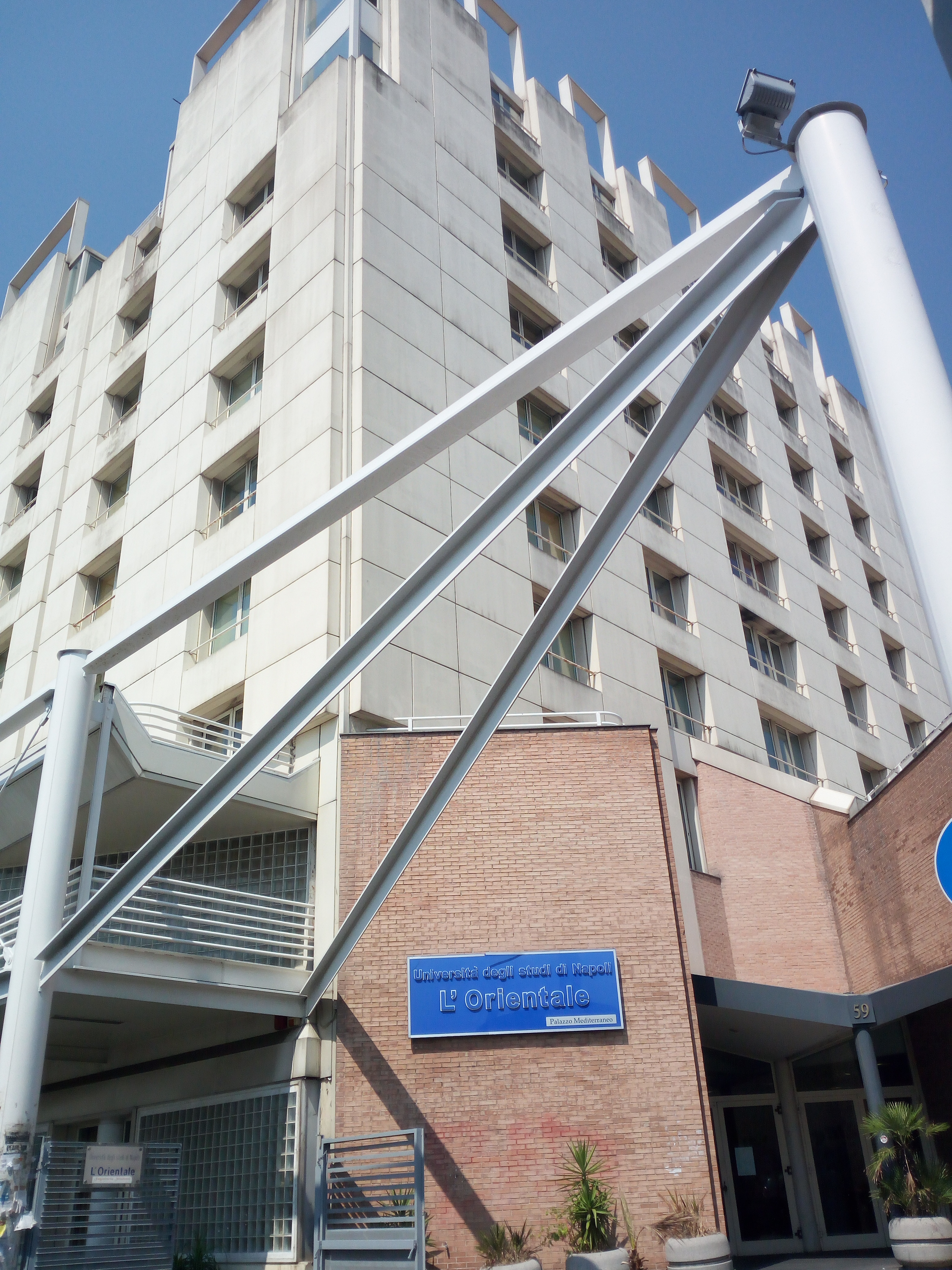 Palazzo del Mediterraneo Università degli Studi di Napoli L'Orientale Agosto 2018